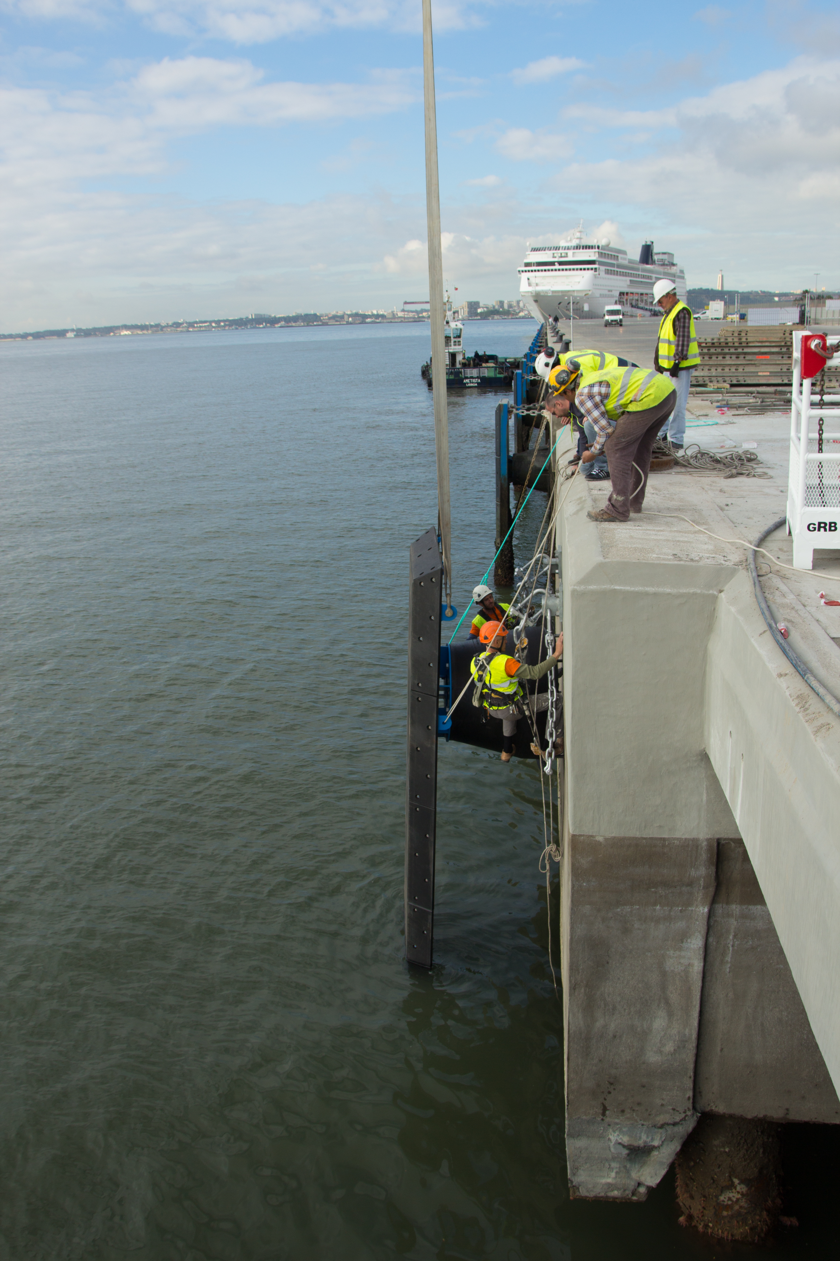 Instalação de defensas marítimas por alpinistas industriais